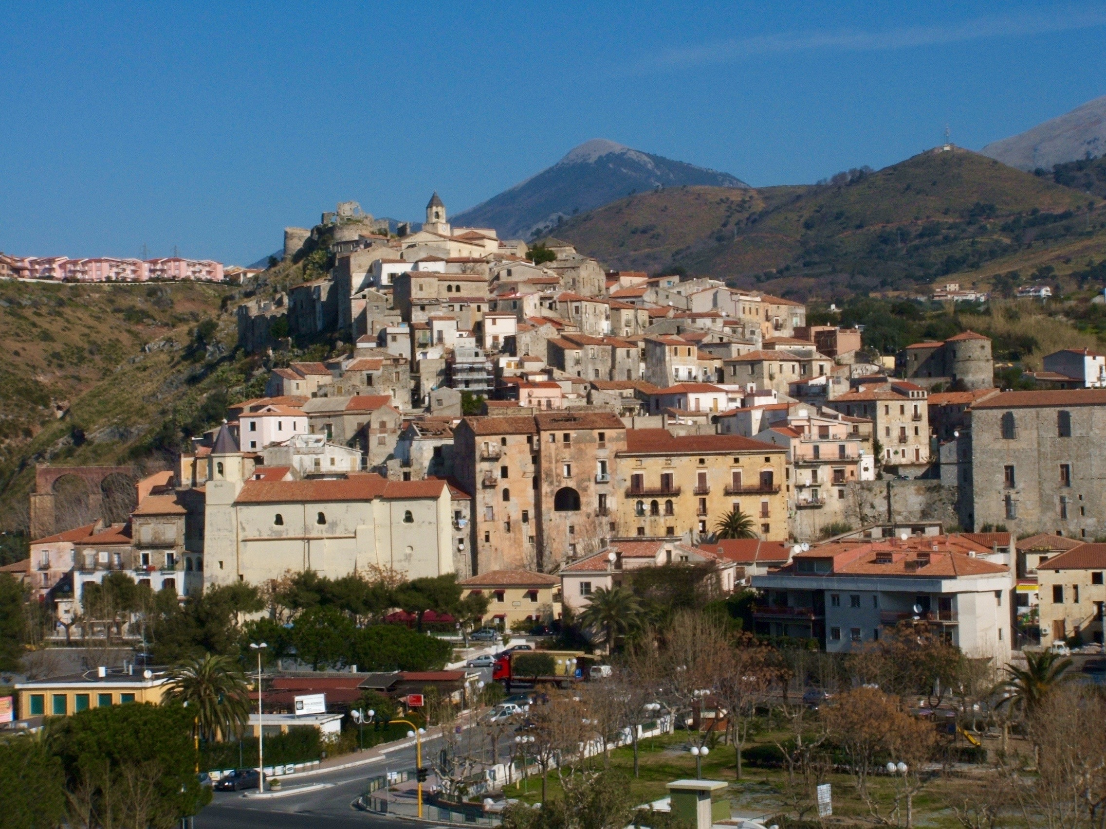 Uno scorcio di Scalea